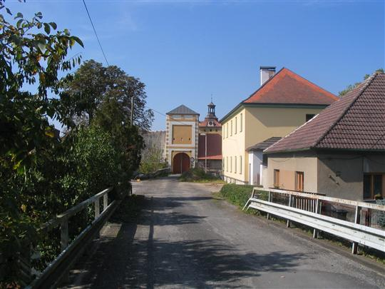 Košátky, brána zámku.